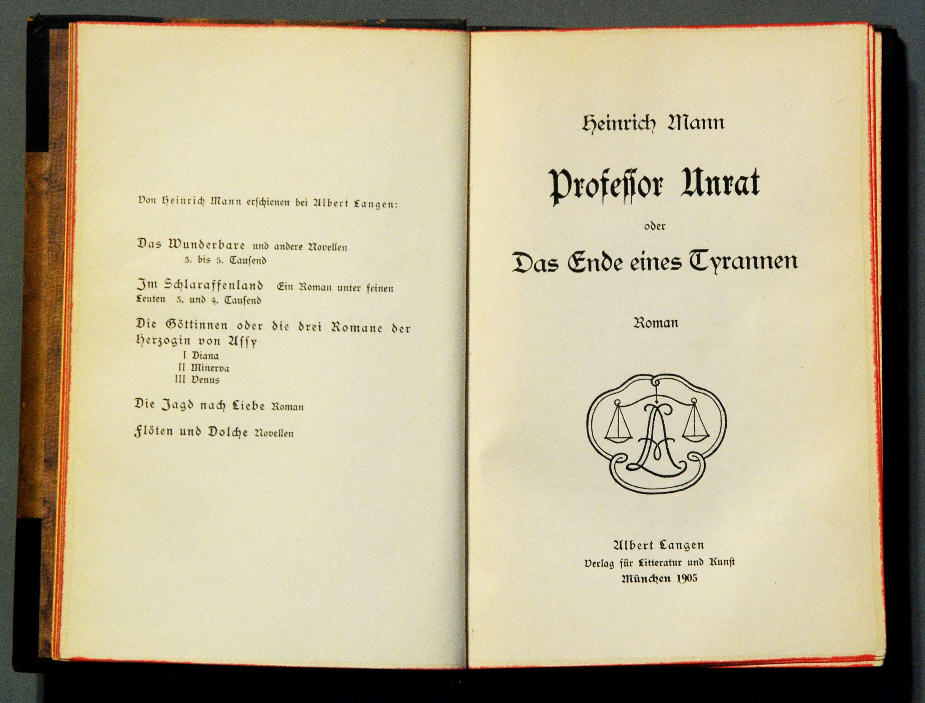 Mann, Heinrich: Professor Unrat oder Das Ende eines Tyrannen. Albert Langen München 1905, 279 S. Erstausgabe (Wilpert/Gühring² 14).